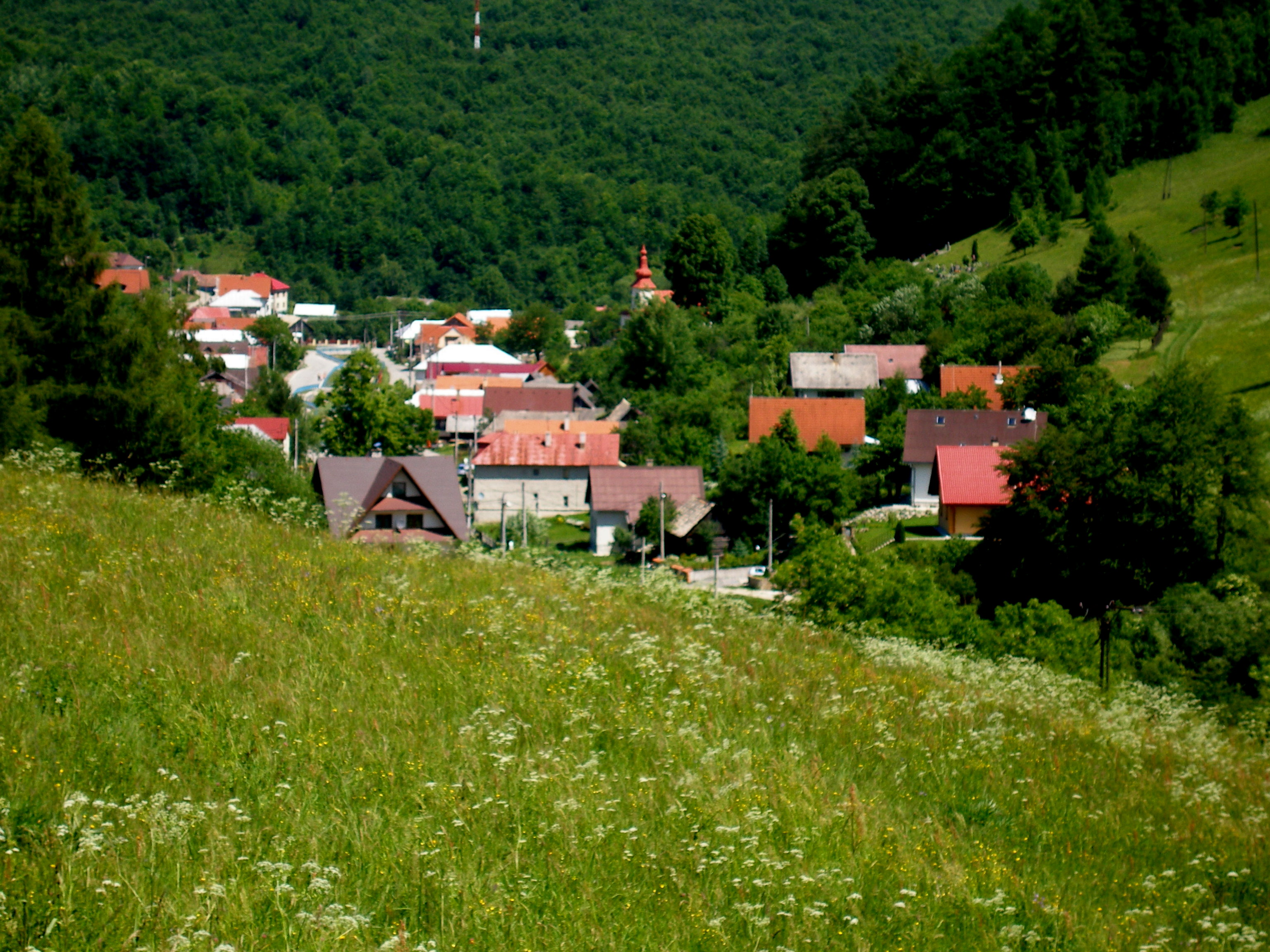 Obec Renčišov okres Sabinov